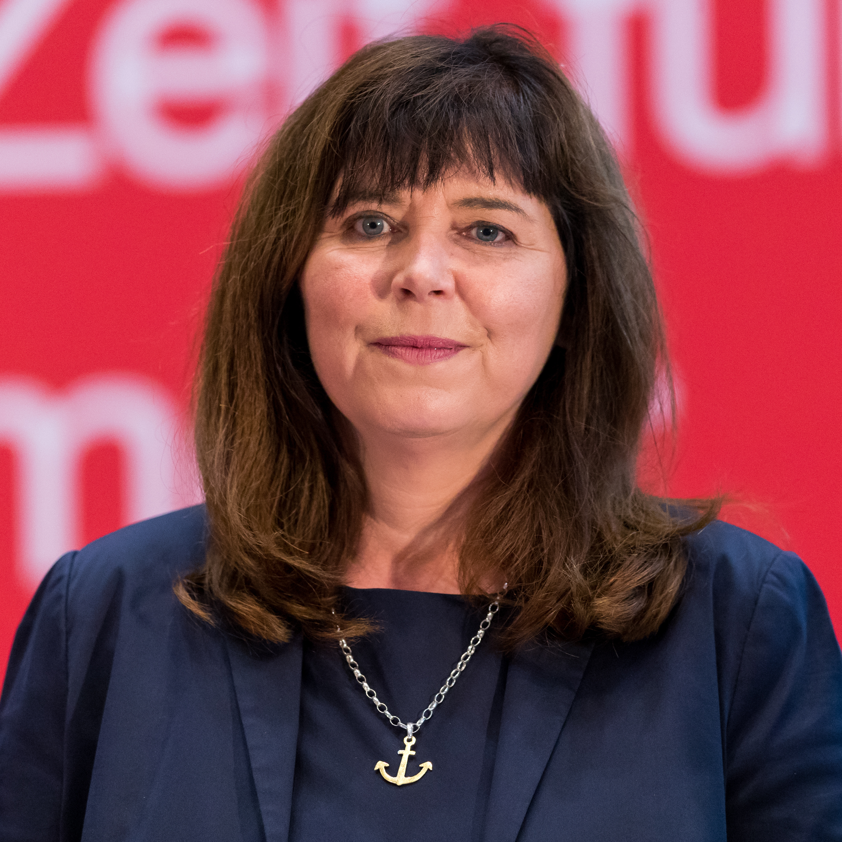 during SPD Wahlkampf Ludwigshafen at Pfalzbau, Ludwigshafen, Rheinland-Pfalz, Germany on 2017-09-13, Photo: Sven Mandel